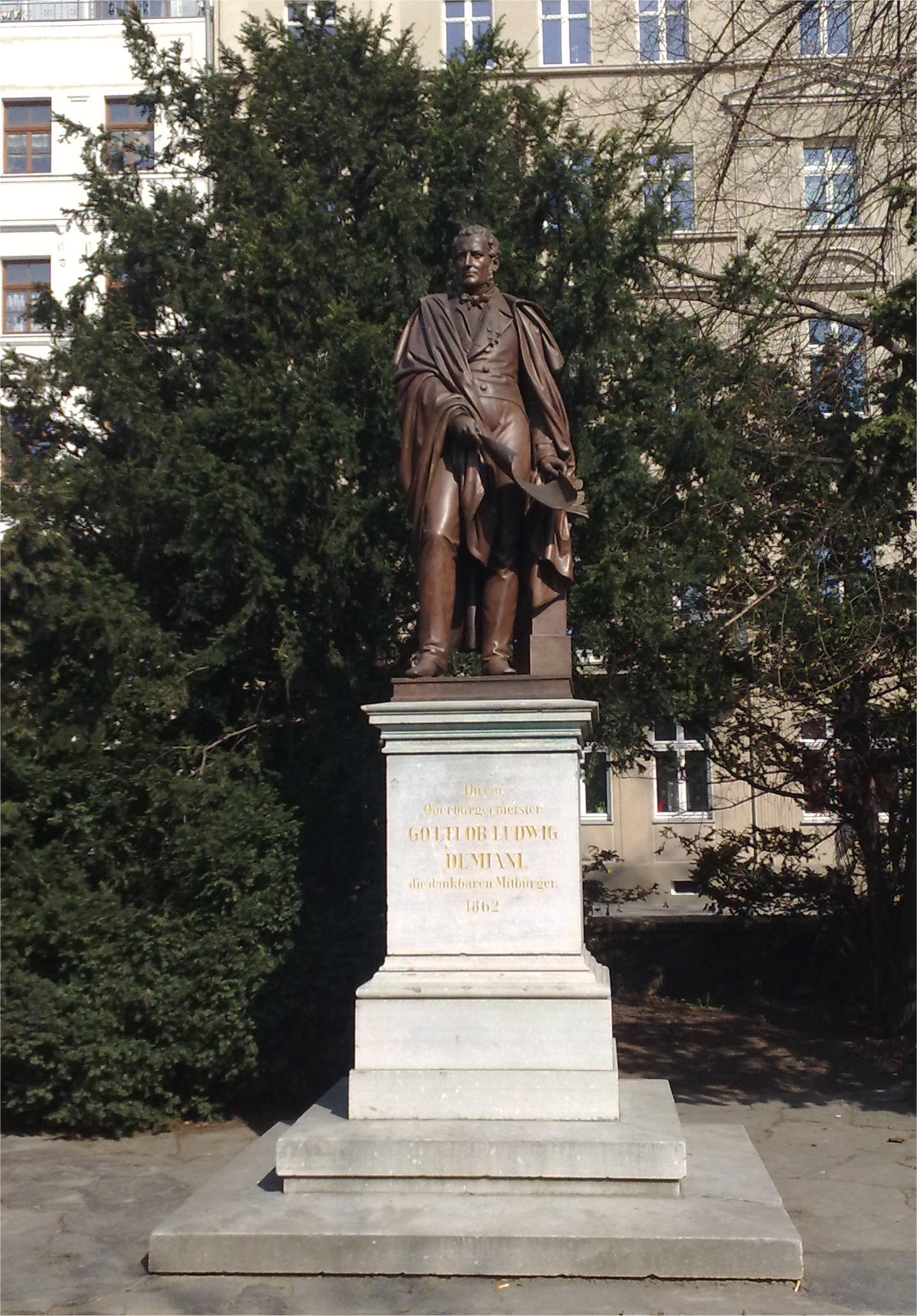 Statue des ehemaligen Görlitzer Oberbürgermeisters Gottlob Ludwig Demiani. Die Statue befindet sich in einem kleinen Park, hinter dem städtischen Theater.